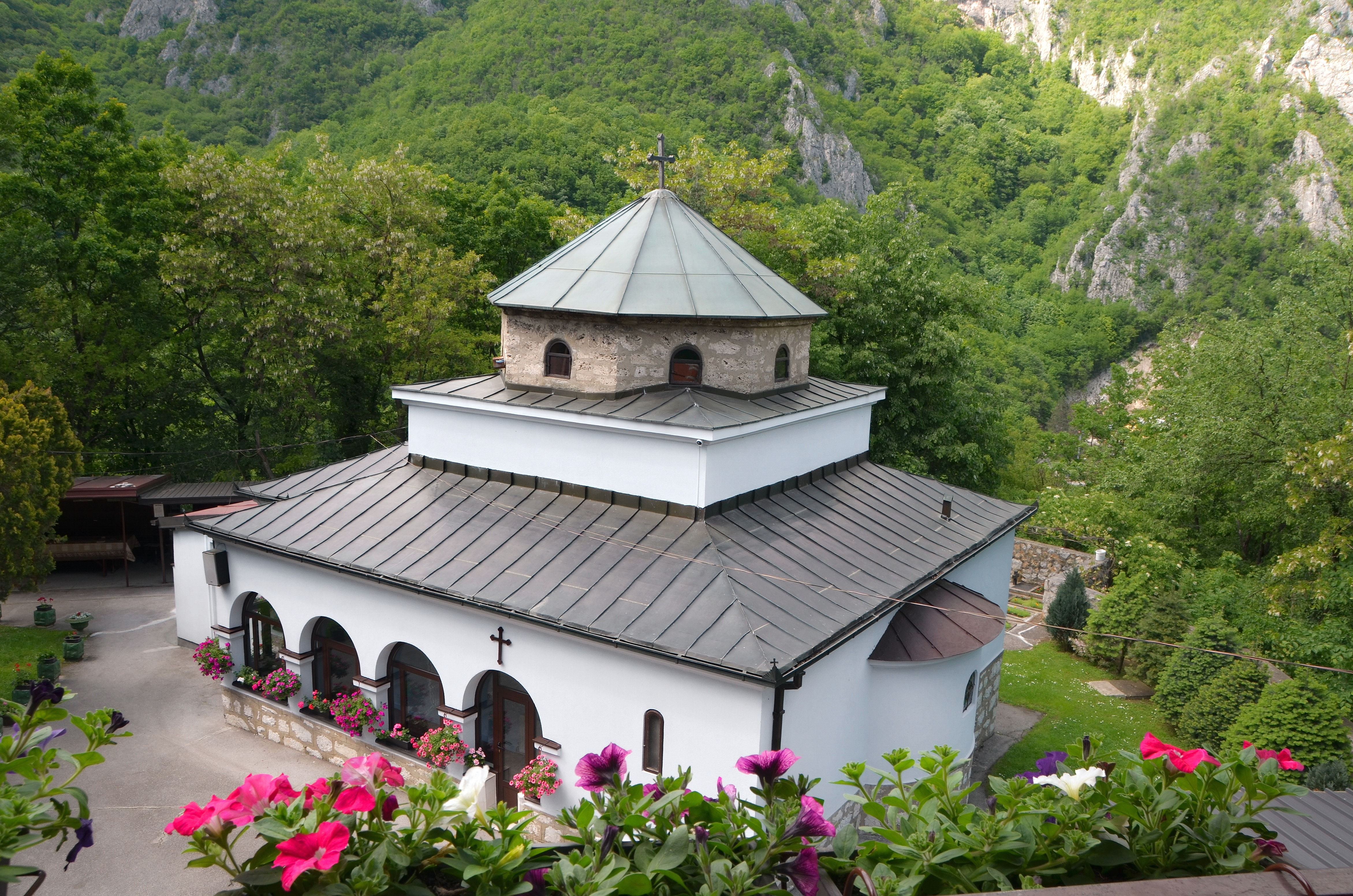 Манастир је више пута био рушен и разаран. По речима Вука Караџића, Преображење је након турске најезде потпуно опустело, али га је 1811. године обновио монах Никифор, потоњи епископ ужички.